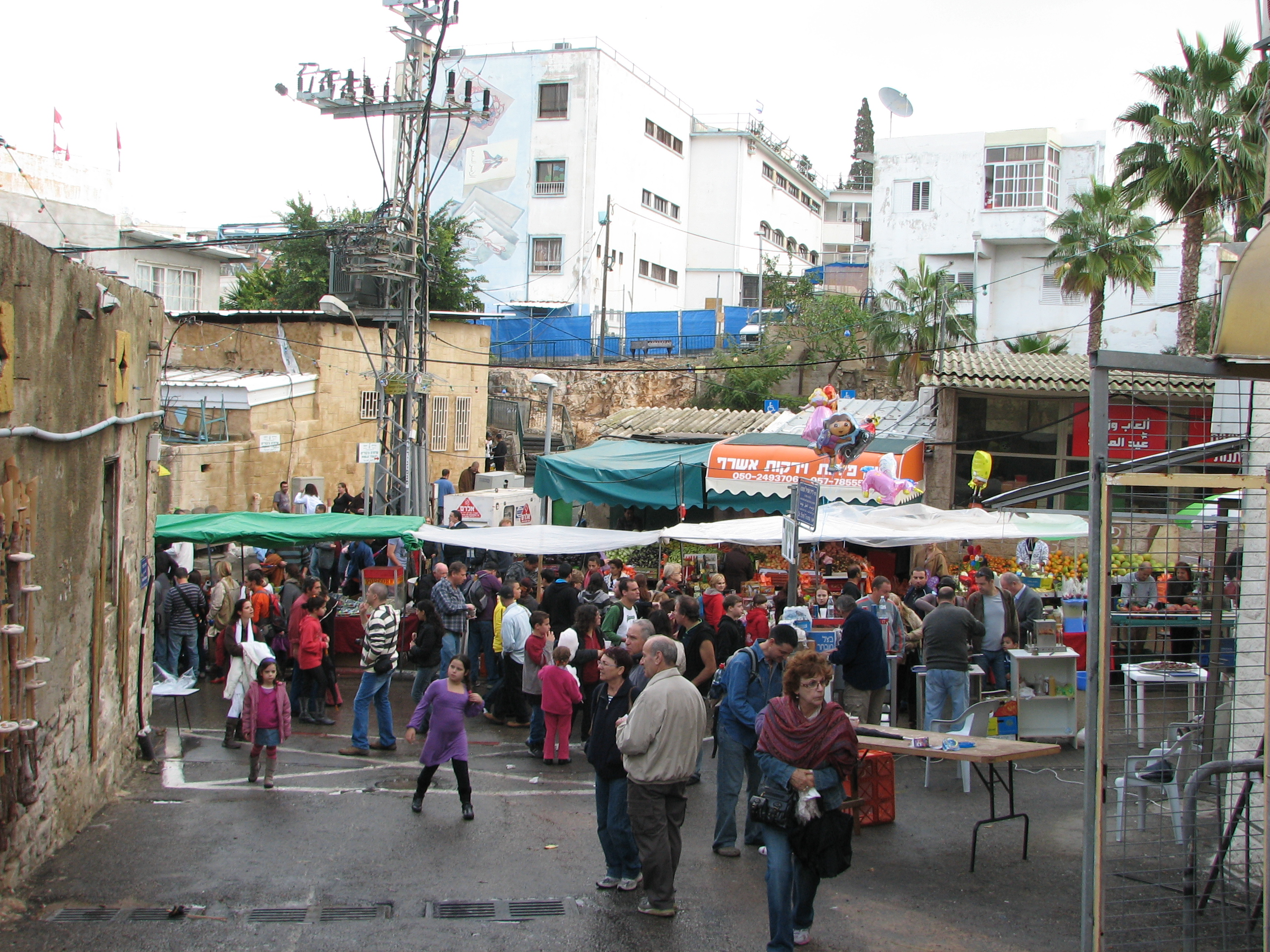 Holiday of Holidays festiva, Haifa Israel החג של החגים הוא פסטיבל הנערך בעיר חיפה מדי שנה, במהלך חודש דצמבר מראו רחוב בזמן הפסטיבל ברחוב הואדי